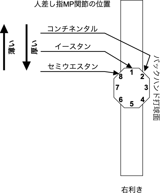 テニスのグリップの厚い薄いを、右利き片手打ちバックハンドの例で図示。